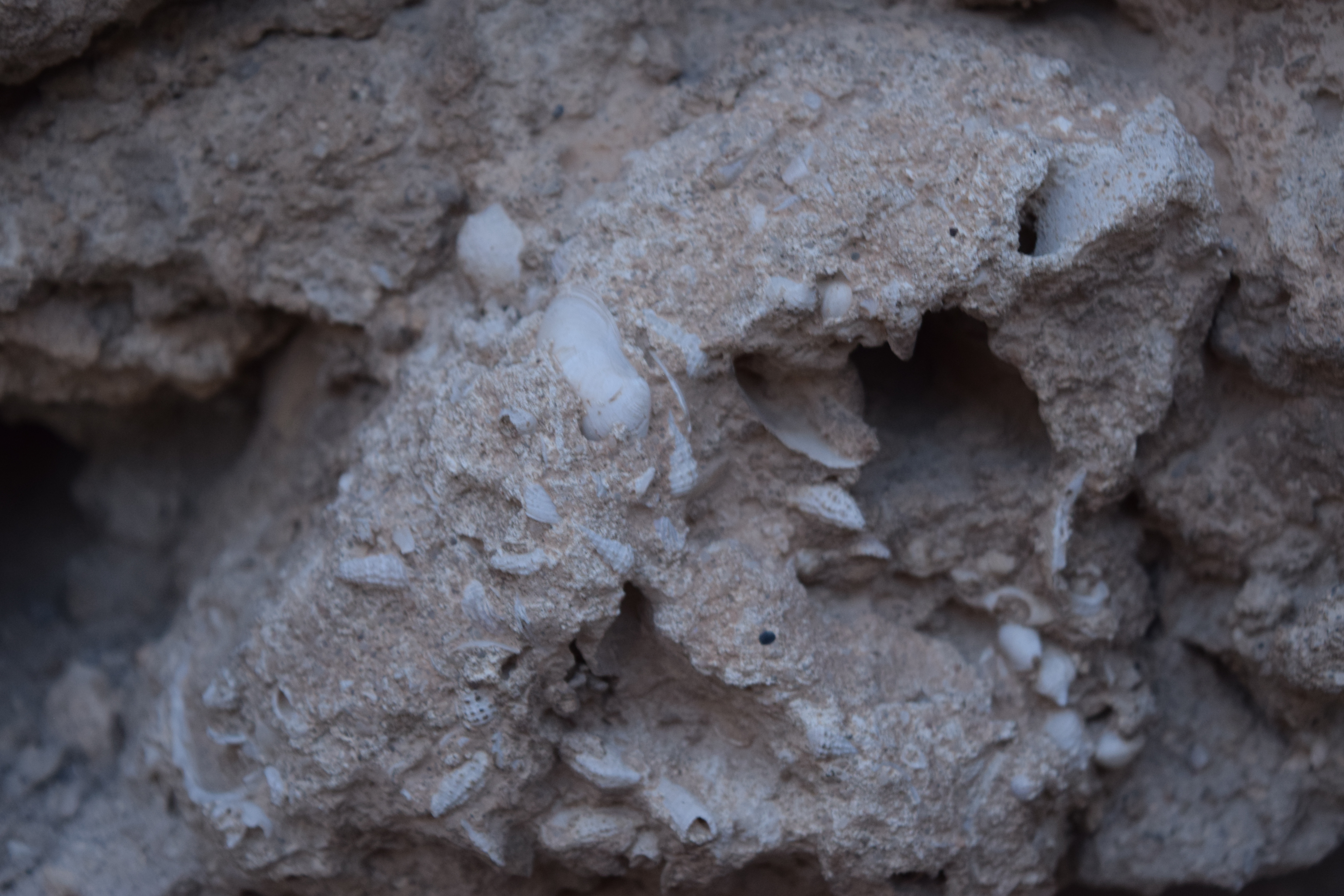 صورة توضح نوع الرمل المستخدم في بناء القلعة